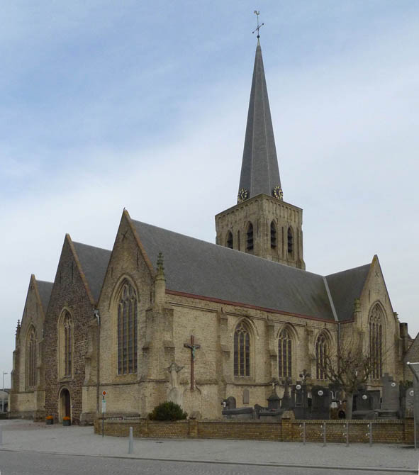 Westvleterendorp_znr_parochiekerkSintMartinus